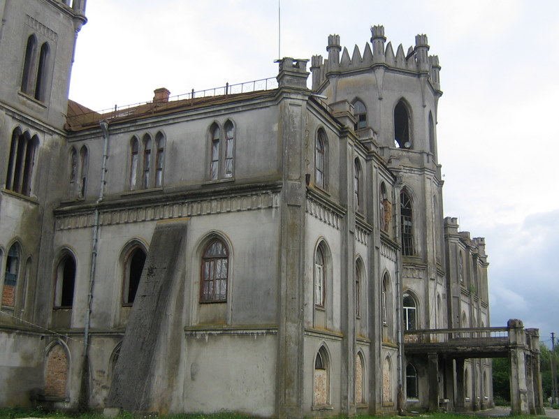 Монастир в смт Червоне